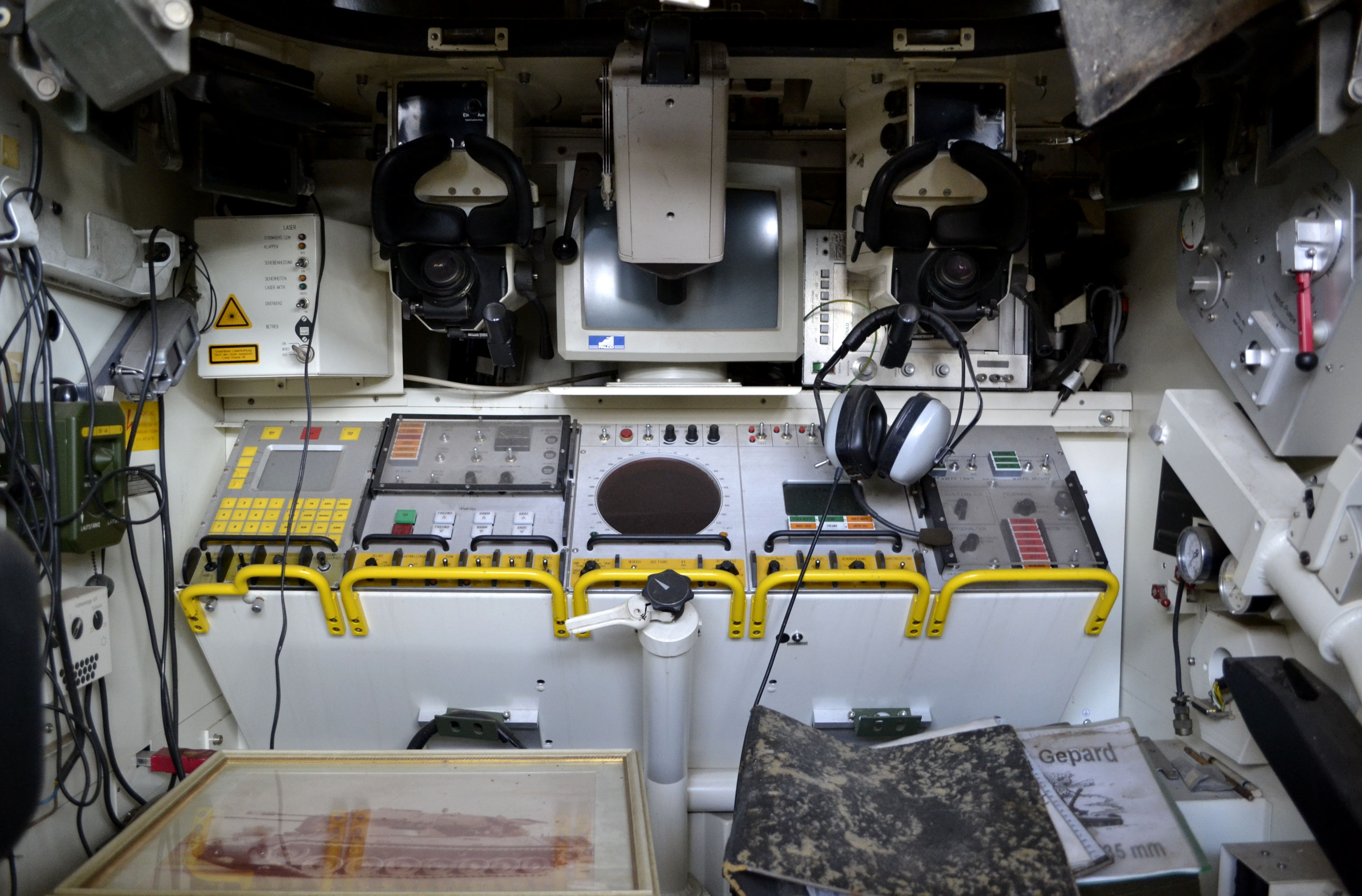 Die Ausbildungsanlage Simulator Flugabwehrkanonenbatterie (ASF) für den Flugabwehrkanonenpanzer Gepard.